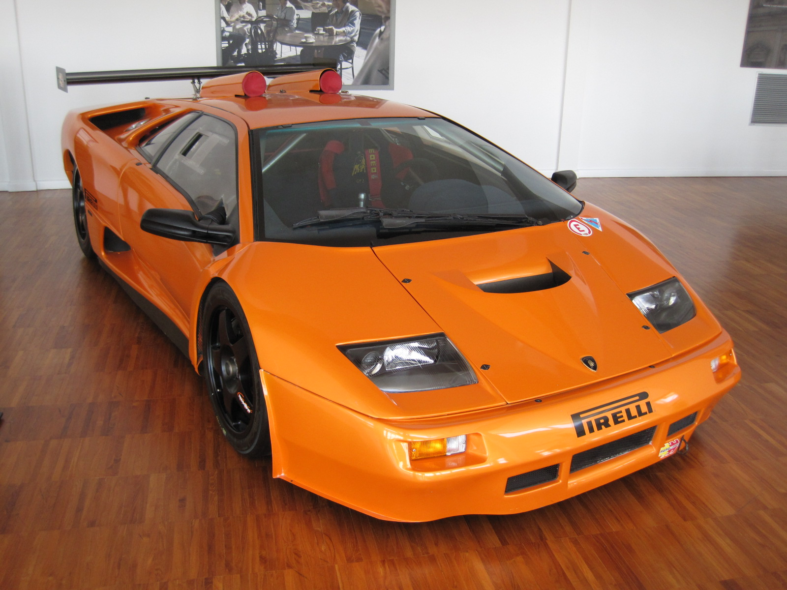 Musée Lamborghini - Diablo GT2